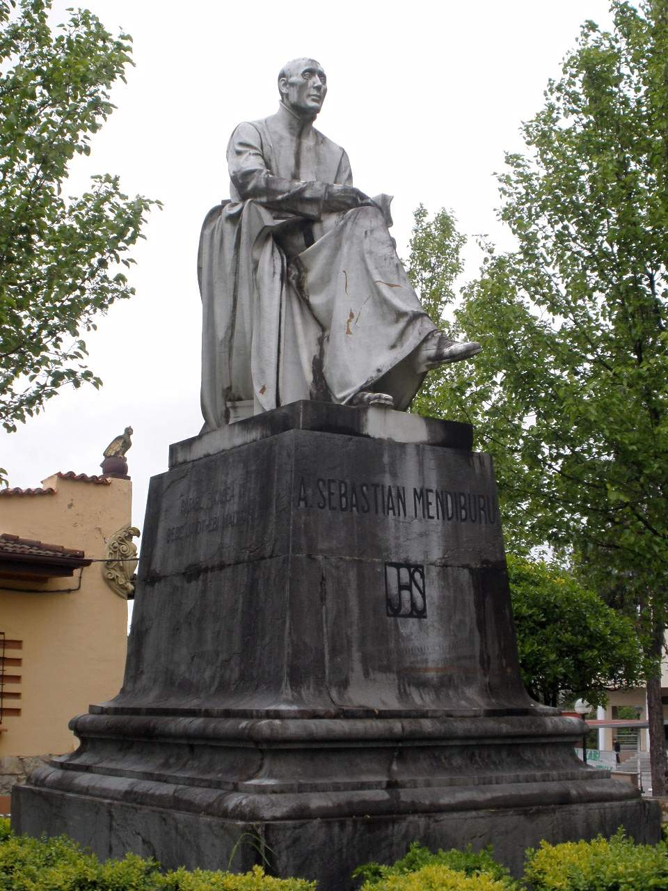 Paisaje urbano de Oiartzun (Gipuzkoa)